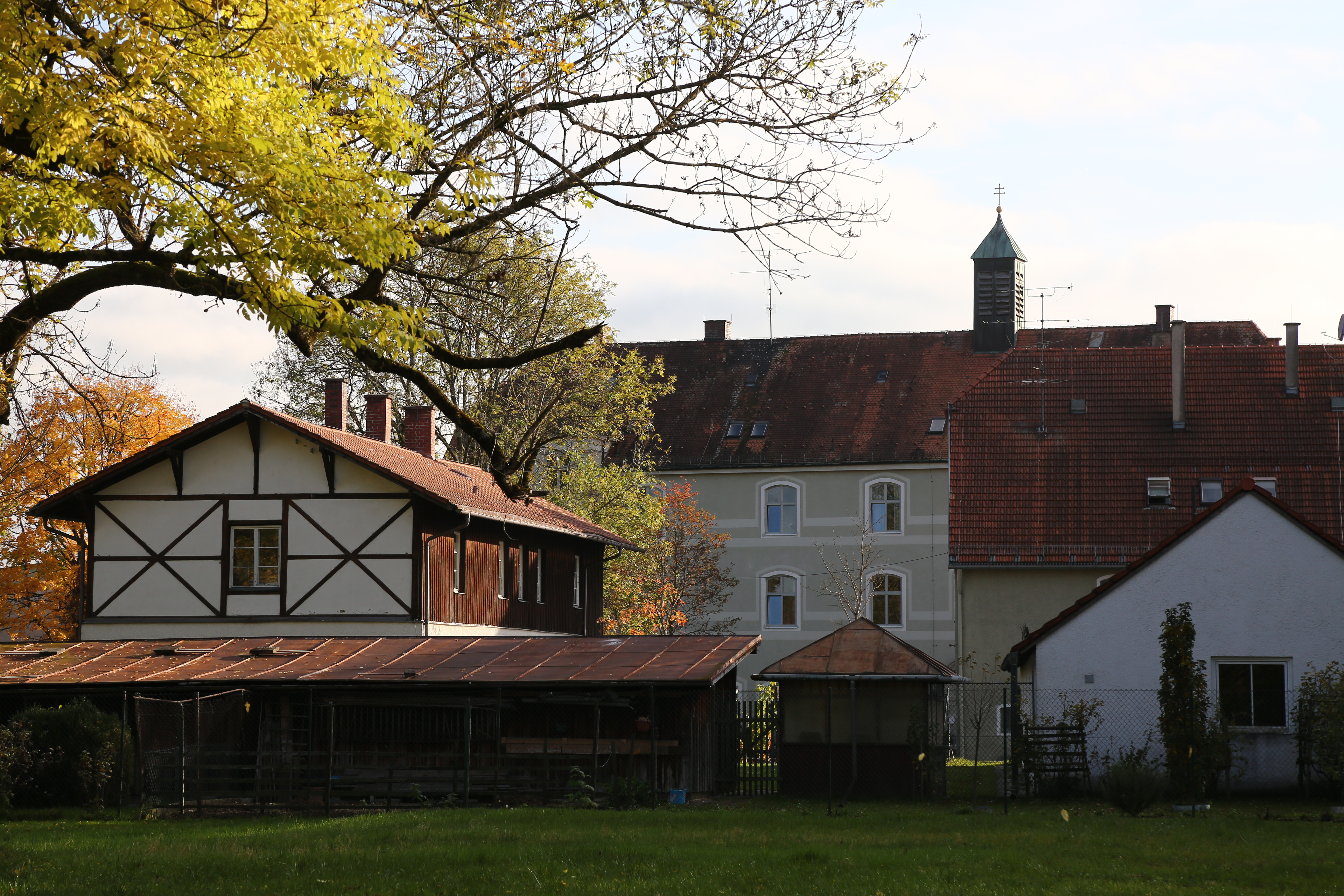 Gut Warnberg in München-Solln. Auf den Gelände eines historischen Gutes befinden sich die Marienanstalt Warnberg, die Privatschule Gut Warnberg, ein Reitstall und weitere Gebäude. Die Anlage von Norden